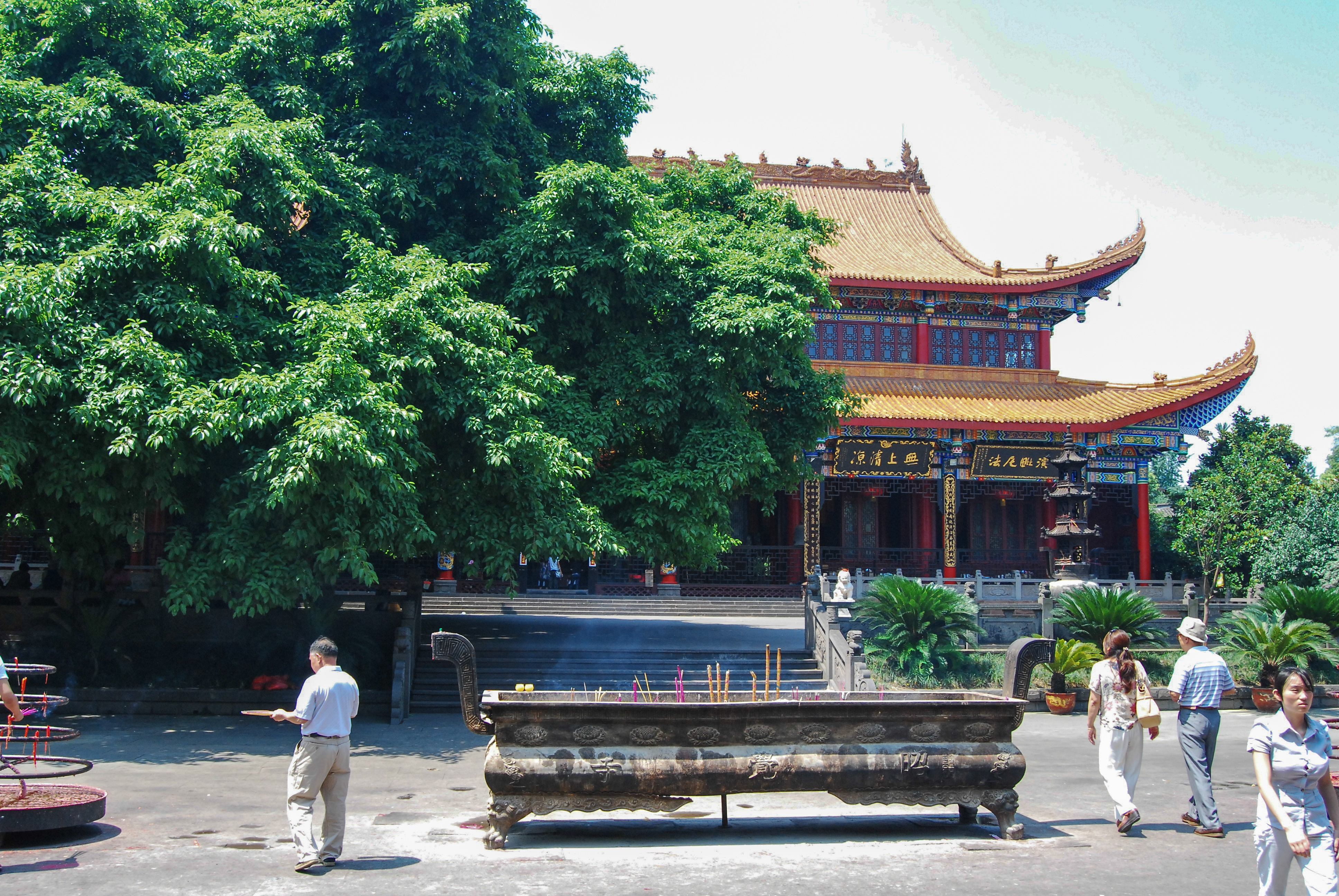 中文（中国大陆）: 成都昭觉寺